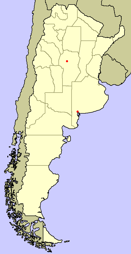 Situación de la revolución libertadora al 16 de septiembre de 1955. Mapa original: Argentina provinces, blank.png